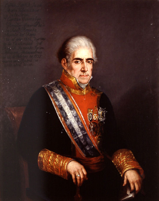 Retrato del marino y politico español Juan María Villavicencio y de la Serna (1755-1830), que fue caballero de la Orden de Alcántara, capitán general de la Real Armada Española y regente de España. El retratado aparece de medio cuerpo, sentado y casi frontalmente, y con el uniforme pequeño de capitán general y de director general de la Armada Española. Además, lleva las solapas abiertas a la moda de 1830-1840, y luce las bandas y placas de las órdenes de Carlos III, San Fernando e Isabel la Católica, así como la placa de la Orden de San Hermenegildo, la venera de la Orden de Alcántara y de la Diadema Real de Marina.